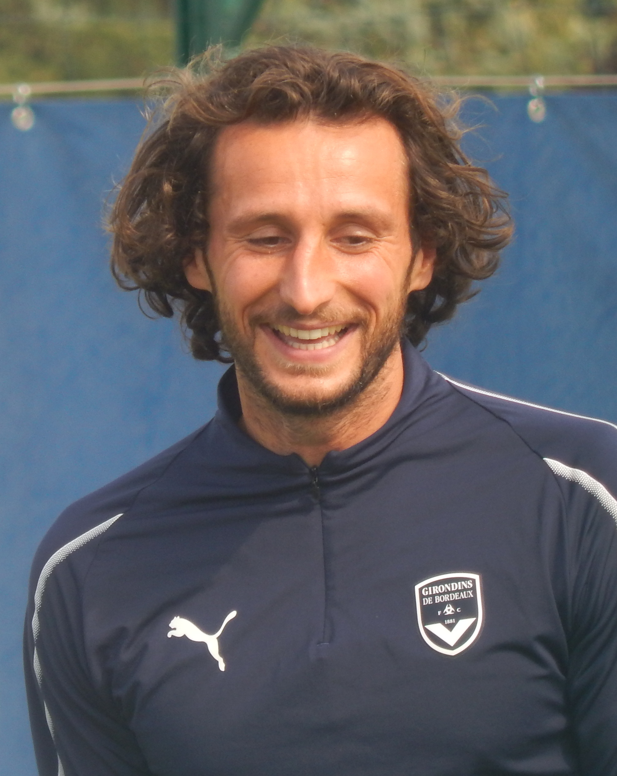 Paul Baysse à l'entraînement avec les Girondins de Bordeaux le 19 juillet 2018.